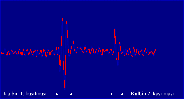 Stetoskop